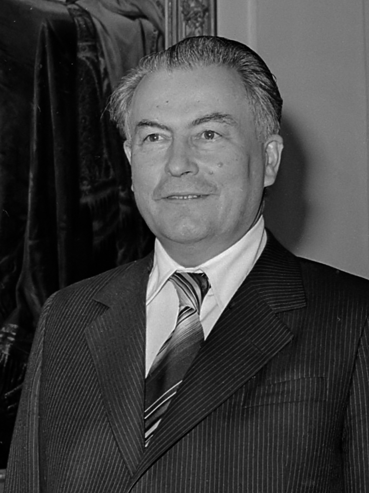 De Hongaarse minister van Buitenlandse Zaken, Frigyes Puja, wordt door Hare Majesteit koningin Juliana ontvangen op paleis Soestdijk 12 september 1978